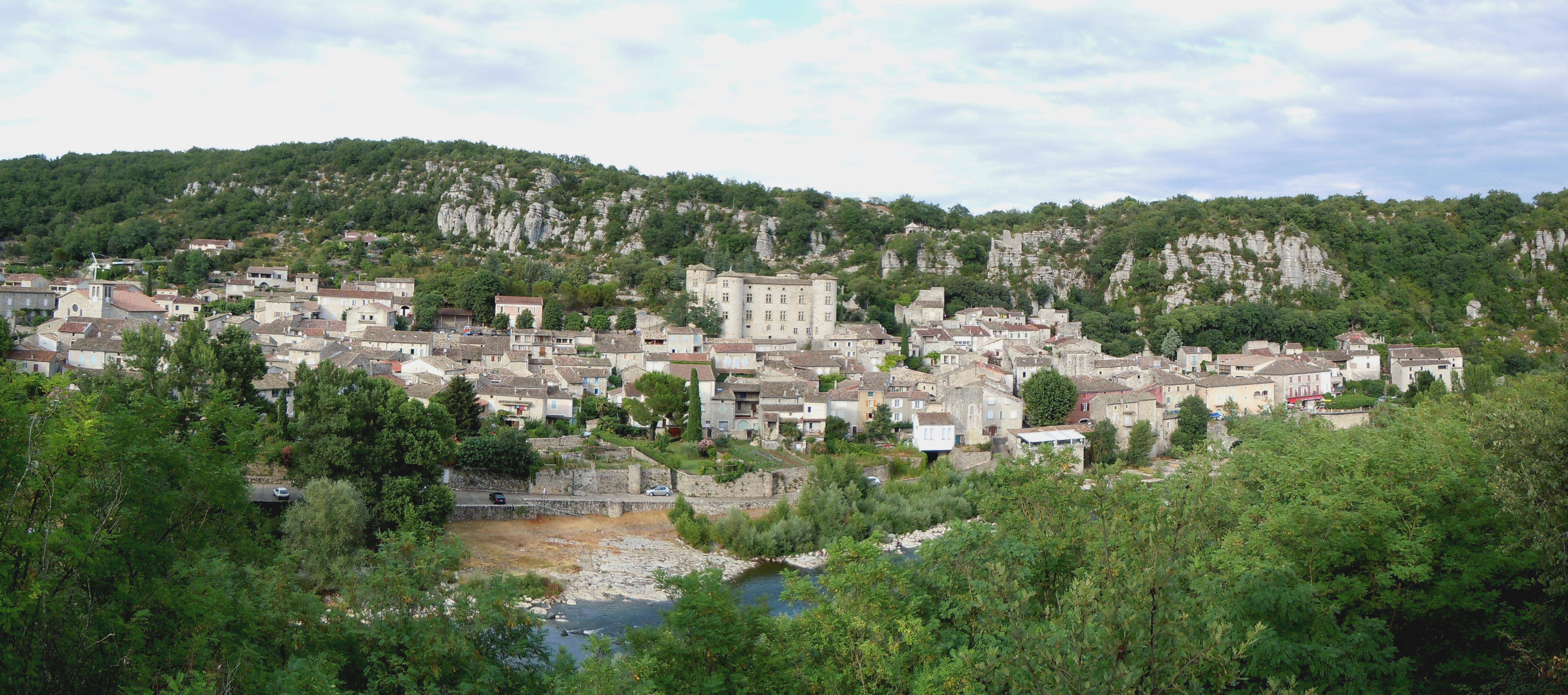 Vogué - Ardèche - Fra,ve - Vue Générale